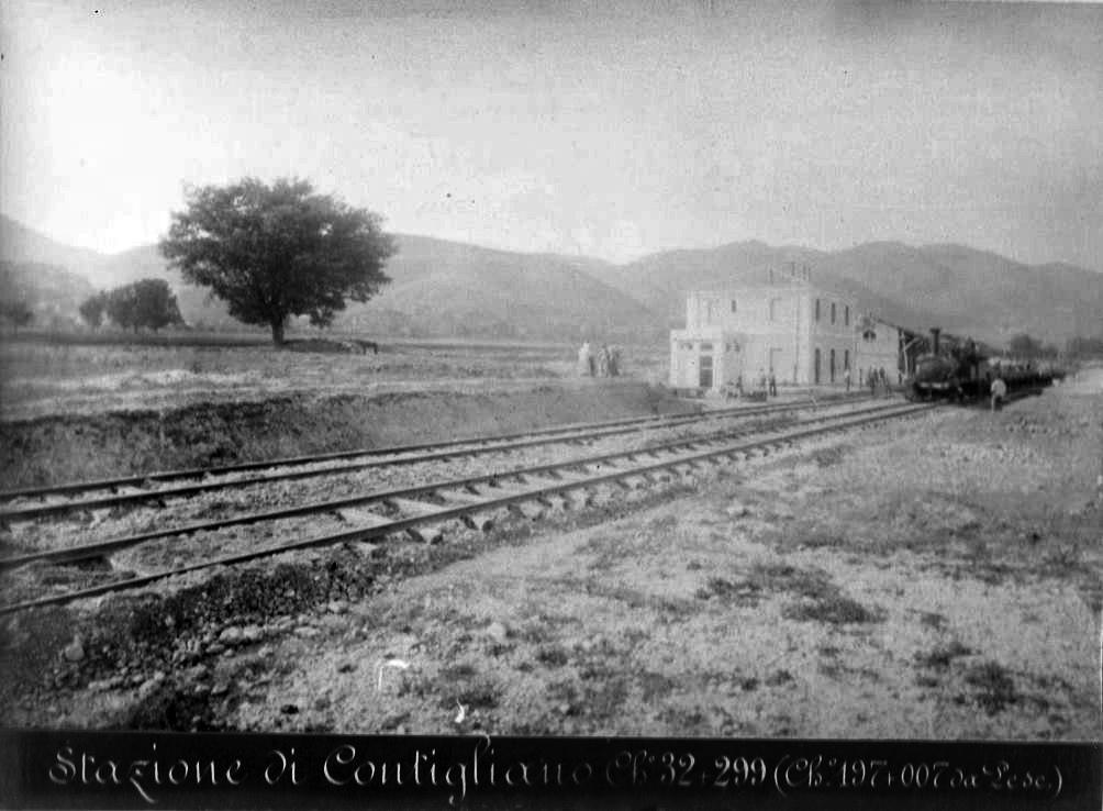 Stazione di Contigliano, al km 198+859 della ferrovia Terni-Sulmona (32+299 da Terni). Immagine tratta dalla raccolta di fotografie sulla costruenda ferrovia Terni-Rieti-L'Aquila, realizzata da Achille Mauri per conto della "Società Italiana per le strade ferrate meridionali" e pubblicata nell'ottobre 1883.